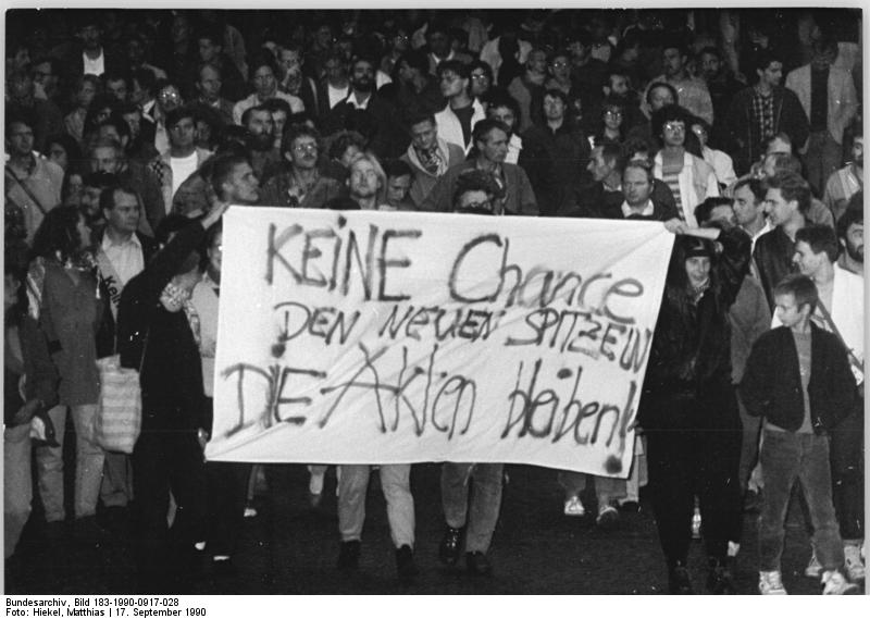 ADN- Matthias Hiekel 17.9.90 Dresden: Zur Montags-Demo für den Erhalt der Stasi-Akten auf dem Territorium der DDR, hatten der "Autonome Arbeiterkreis Wolfspelz " und das Neue Forum aufgerufen. Unter dieser Losung zog der über 1000 Mann starke Zug von der ehemaligen Stasizentrale zum Rathaus.